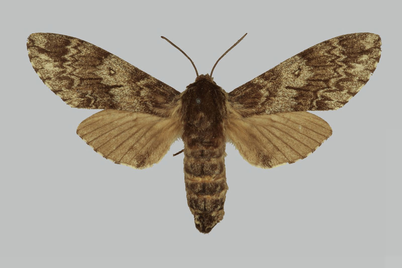 Dolbina grisea, female, upperside. Tajikistan, Gissar Mountains, Kondara Valley